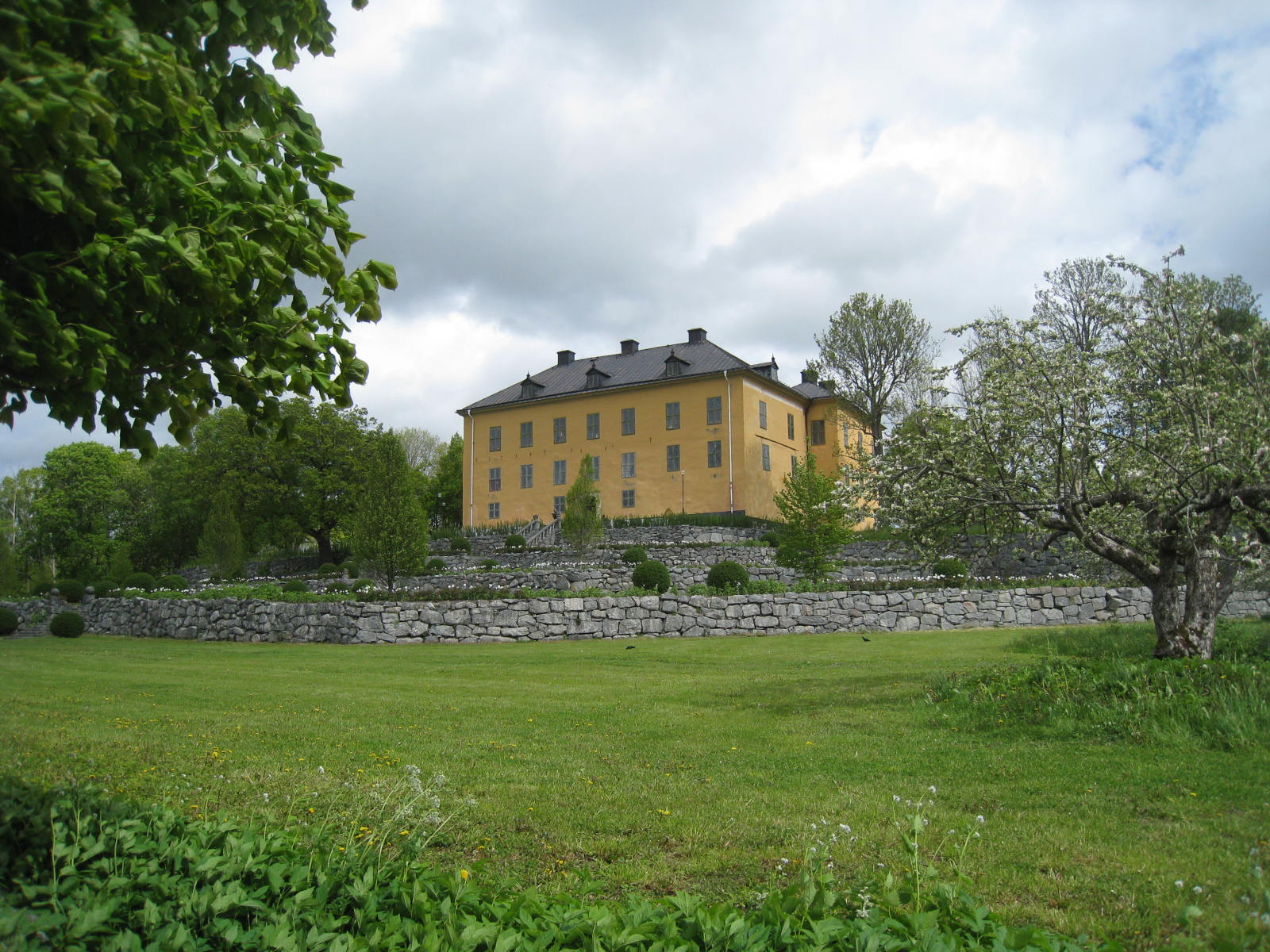 Wenngarns slott, Sigtuna, Uppland, vy från söder.